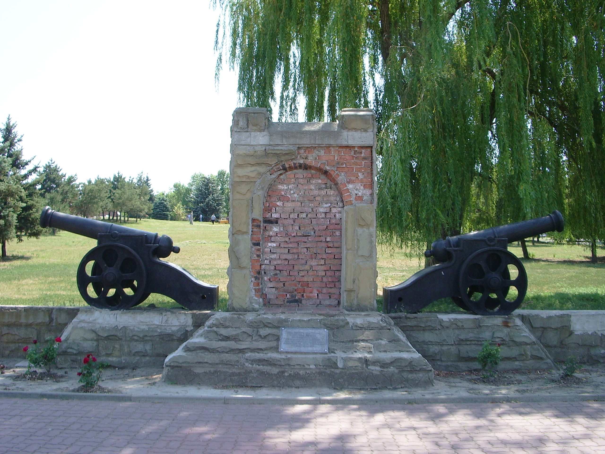 Мемориал с пушками. Азов. 2007